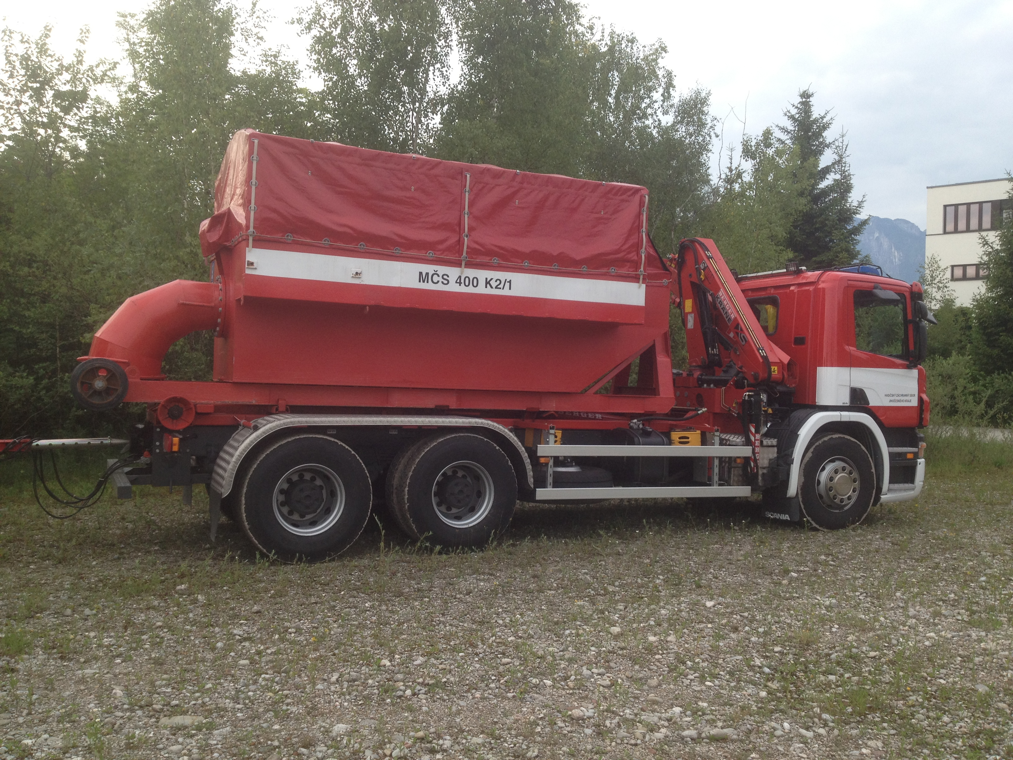 Truck mit einer Hochleistungspumpe der tschechischen Feuerwehr auf der Übung Taranis in Salzburg